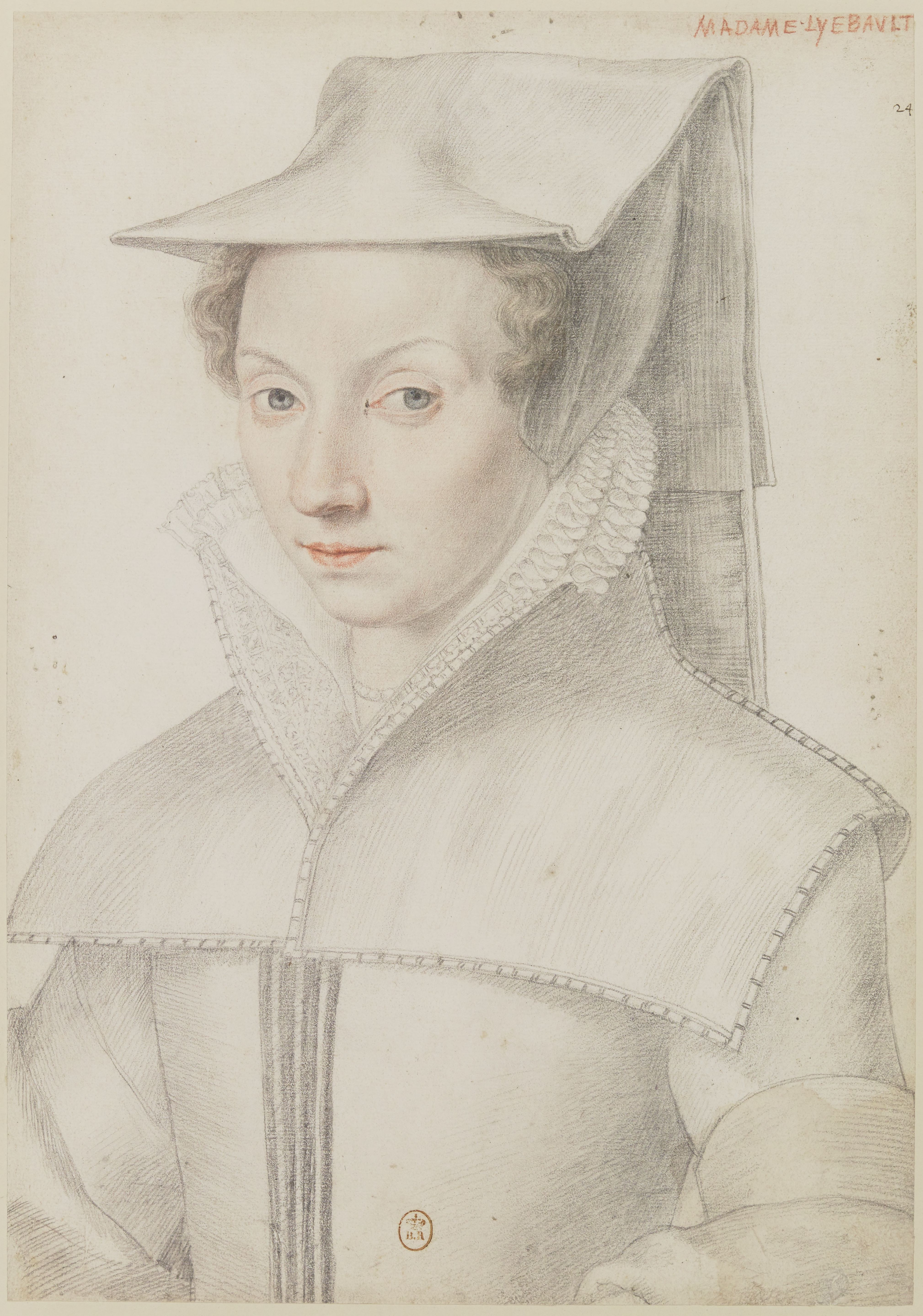 Madame Lyebault (Nicole Estienne), dessin, anonyme, 1573, Collection Jacques-Joseph Lecurieux. Bibliothèque nationale de France, département Estampes et photographie, RESERVE BOITE FOL-NA-22 (15).